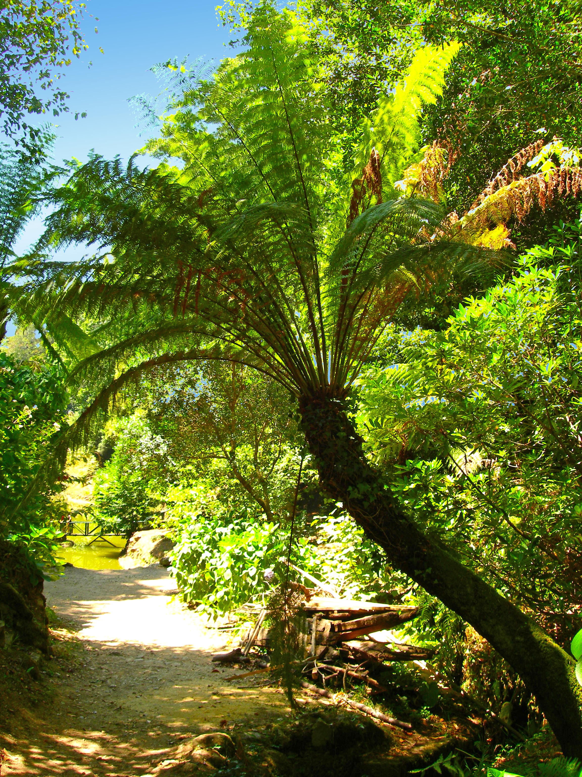 Vale dos Fetos (Bussaco) This file was uploaded for Wiki Loves Monuments in Portugal with the unique identifier 74851.